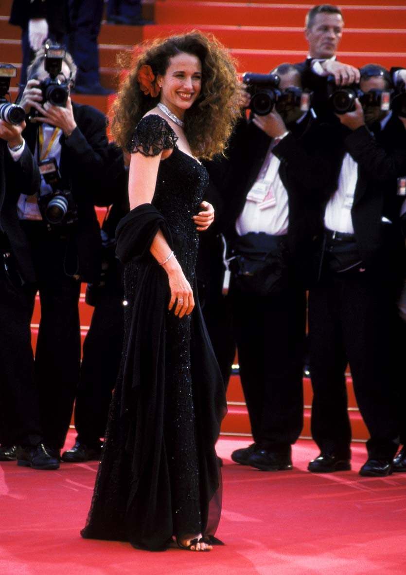 Andie MacDowell MacDowell, Andie in Cannes Film Festival in 2001. My own picture. Created by Rita Molnár 2001.